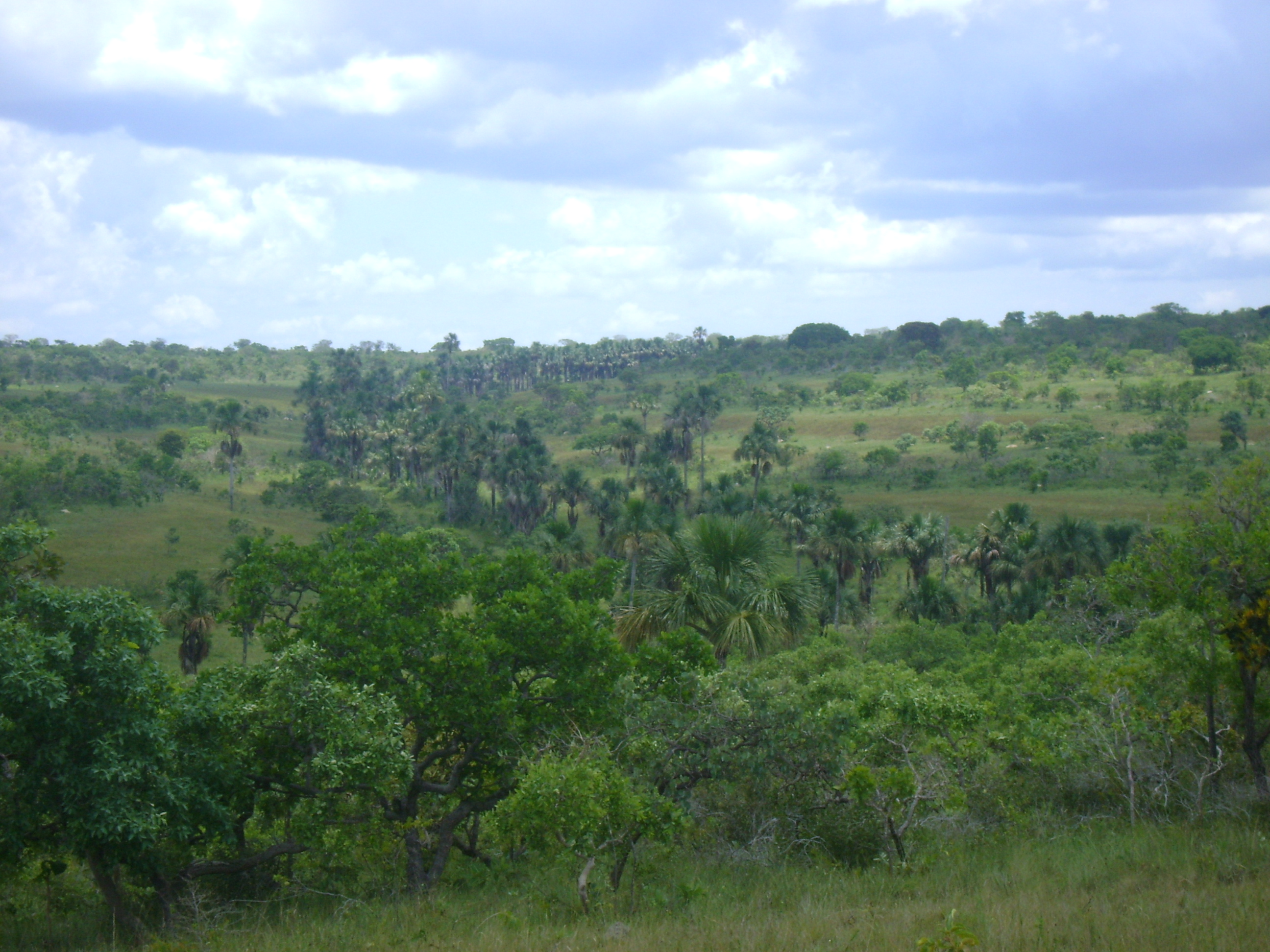 Vereda de Encosta afluente do Córrego Veredão, no extremo norte do município de Brasilândia de Minas, Minas Gerais, Brasil.